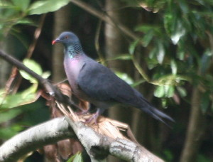 Columba bollii (original comment : Lorbeertaube, La Palma)